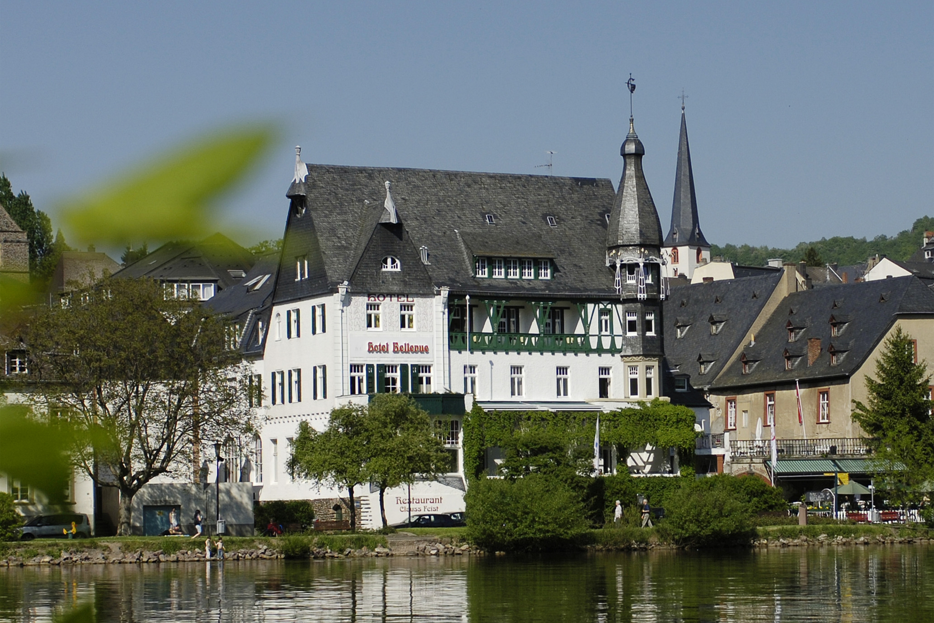 Seit 1992 steht das Vier Sterne Superior Hotel unter der persönlichen Leitung Ihres Gastgebers Matthias Ganter und wird kontinuierlich restauriert und erweitert.